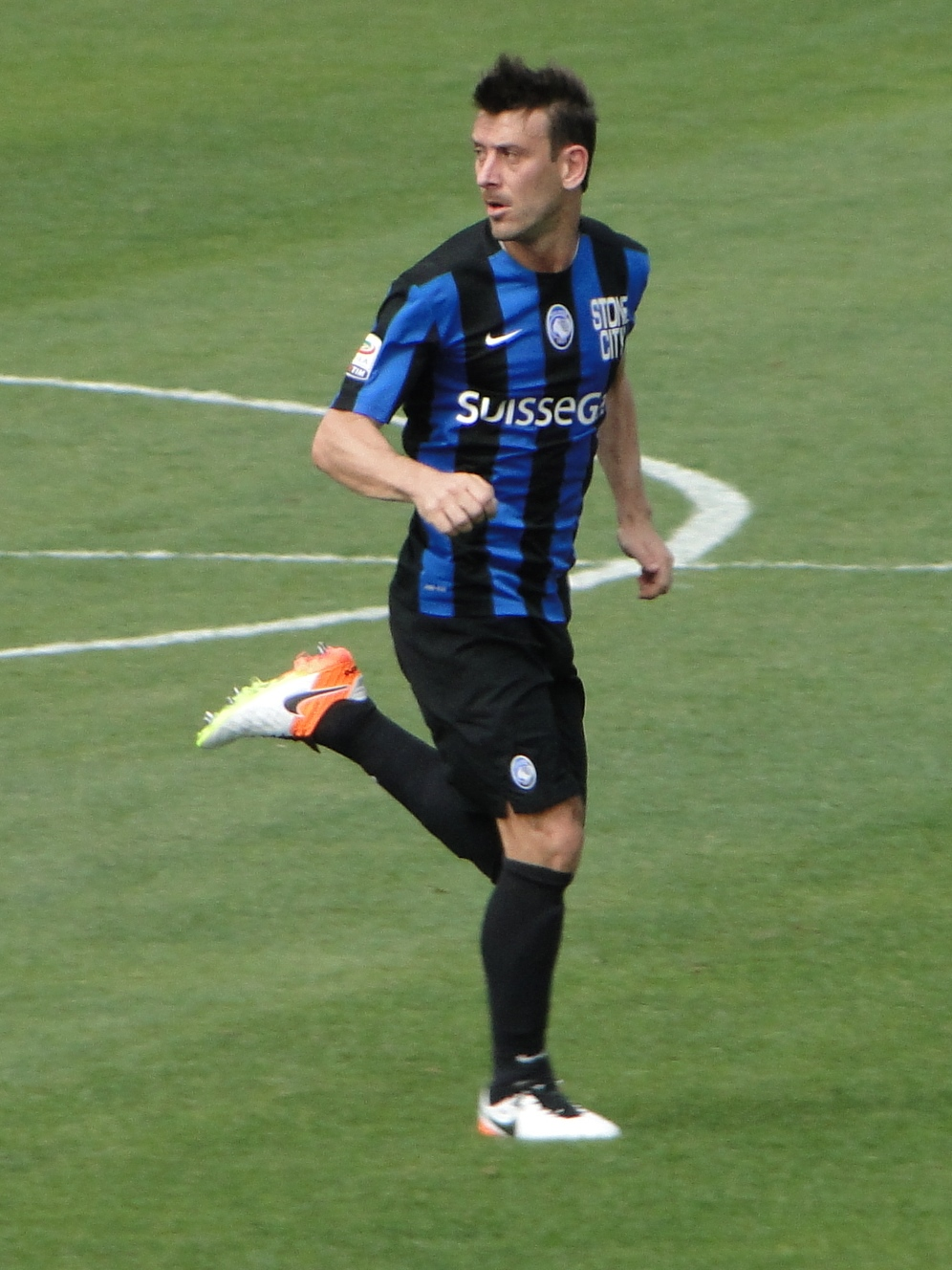 Gianpaolo Bellini, calciatore italiano